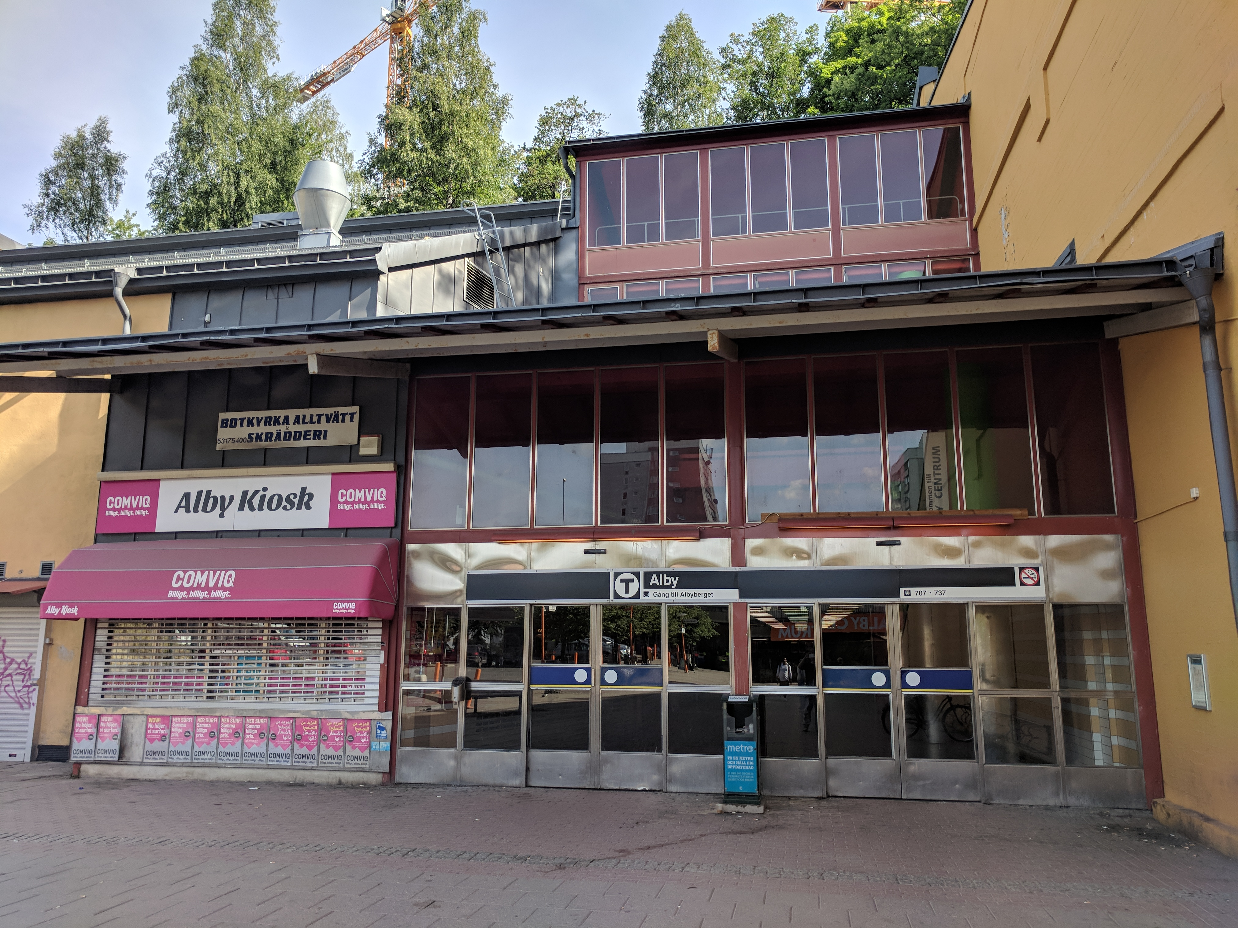 Alby tunnelbana